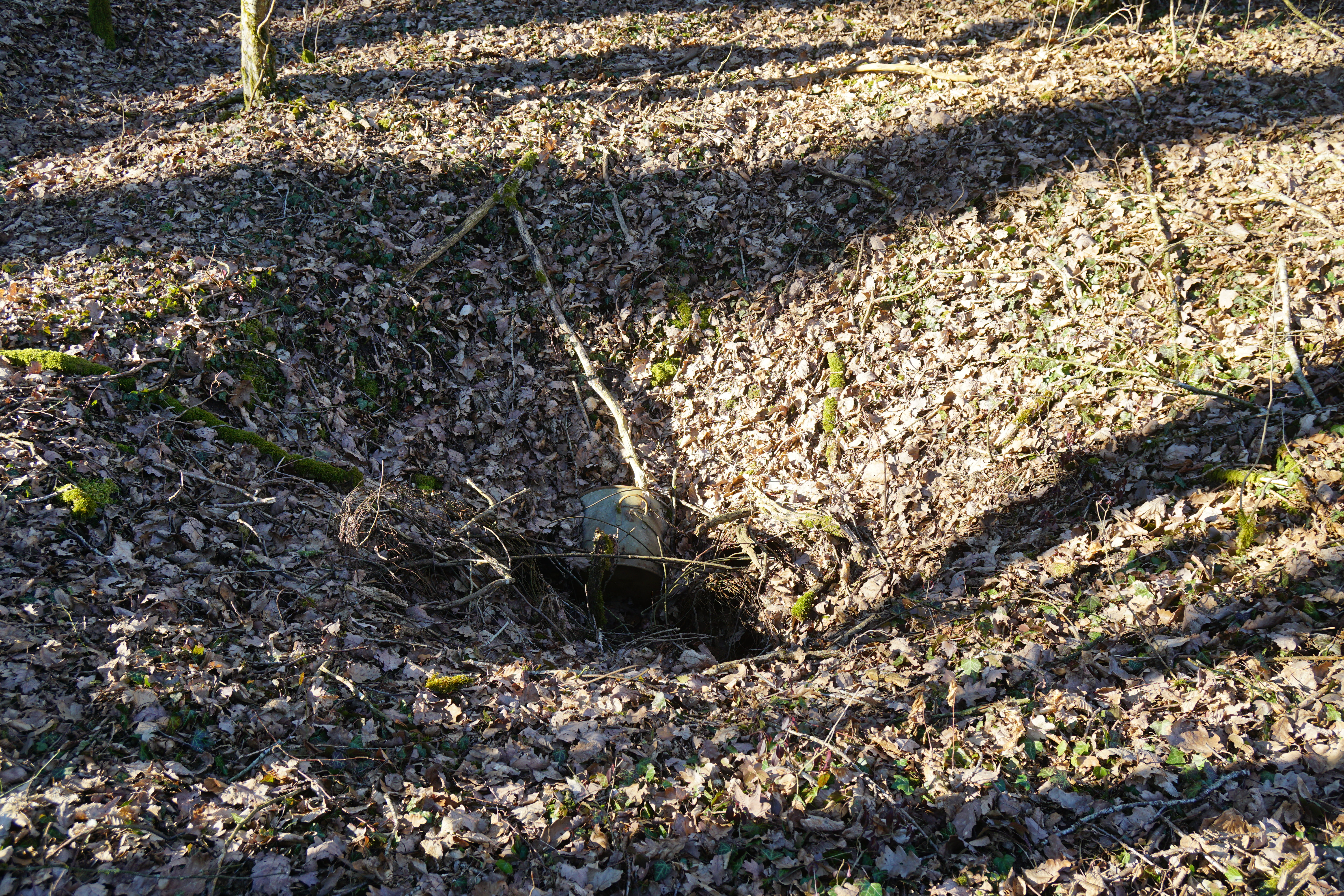 L'entonnoir formé par le puits n° 3 (concession de Norroy).